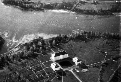 Bilden visar Bodforsen där Bodån mynnar i Lule älv. Byggnaderna i förgrunden är Bodens ingenjörkårs nya officersbostäder.